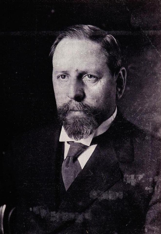 Augusto Bruna Valenzuela Empresario y Senador chileno.